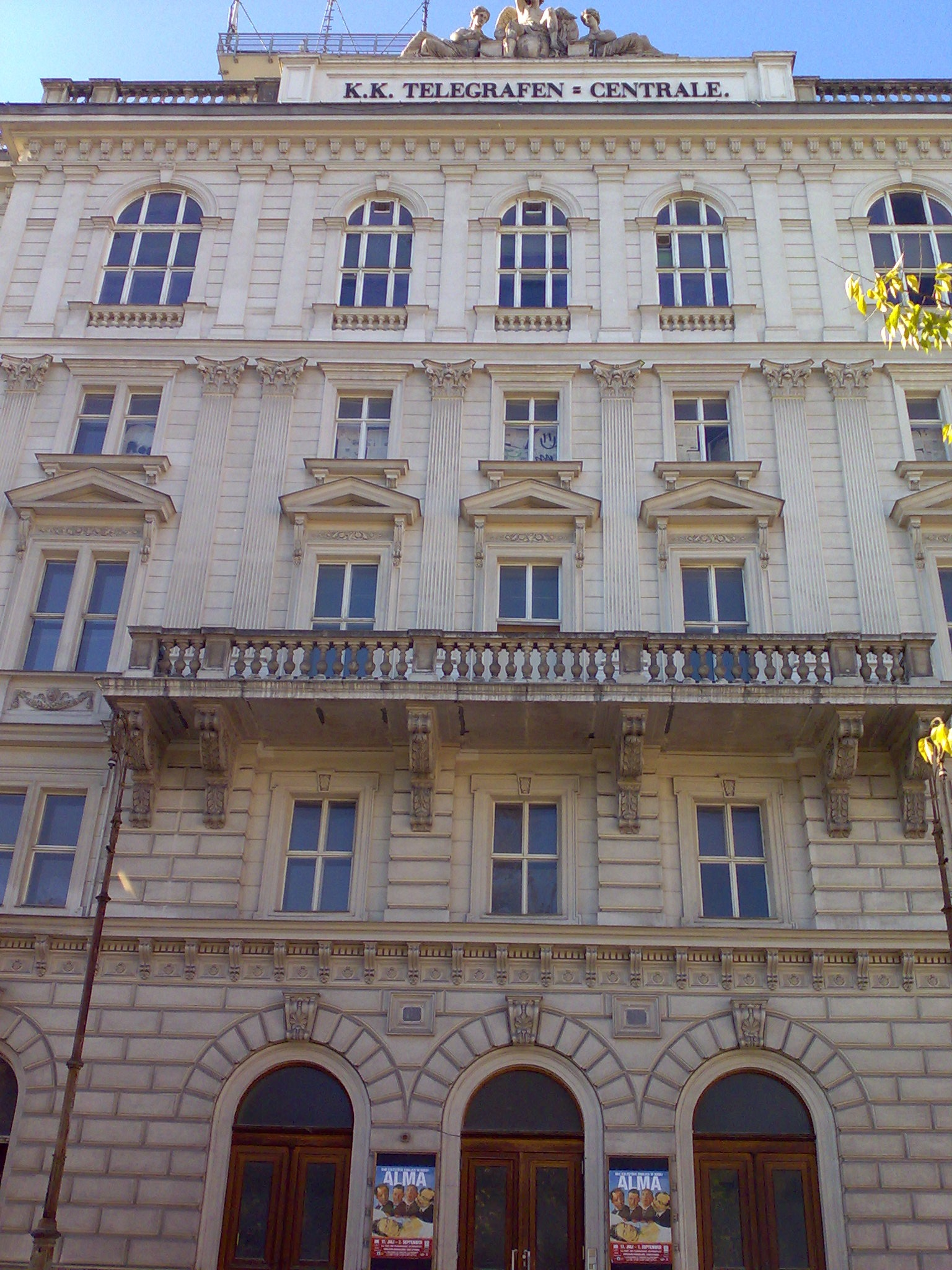 Österreichische Post- und Telegraphenverwaltung